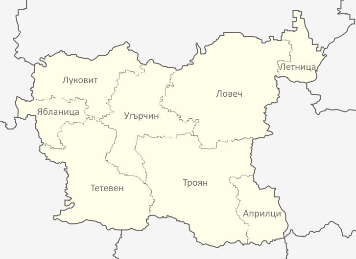 Картата е създадена от Любомир Таушанов